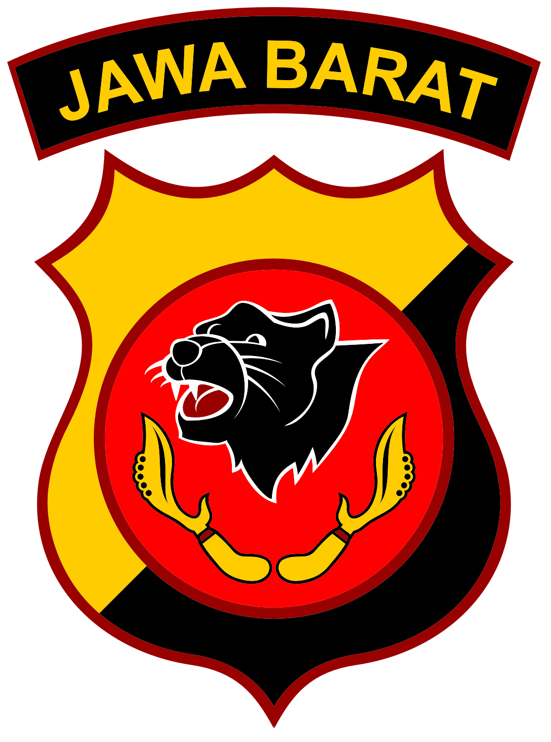 Gambar ini adalah Lambang Kepolisian Daerah Jawa Barat